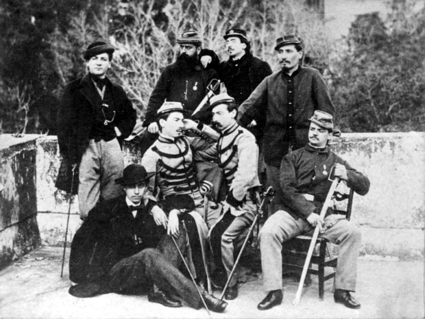 Gruppo di ufficiali garibaldini ritratti dopo la Battaglia del Volturno sulla terrazza della Villa reale di Napoli il 3 ottobre 1860. Da sinistra in piedi il luogotenente Adolfo Faconti, i capitani Camillo Zancani e Oreste Baratieri, il luogotenente Enoch Bezzi (fratello di Ergisto). Seduti da sinistra il sottotenente Francesco Martini, il capitano Ergisto Bezzi, il luogotenente Filippo Tranquillini e il luogotenente Giuseppe Fontana. L'ora più bella: fotografia e memoria del Risorgimento, p. 367